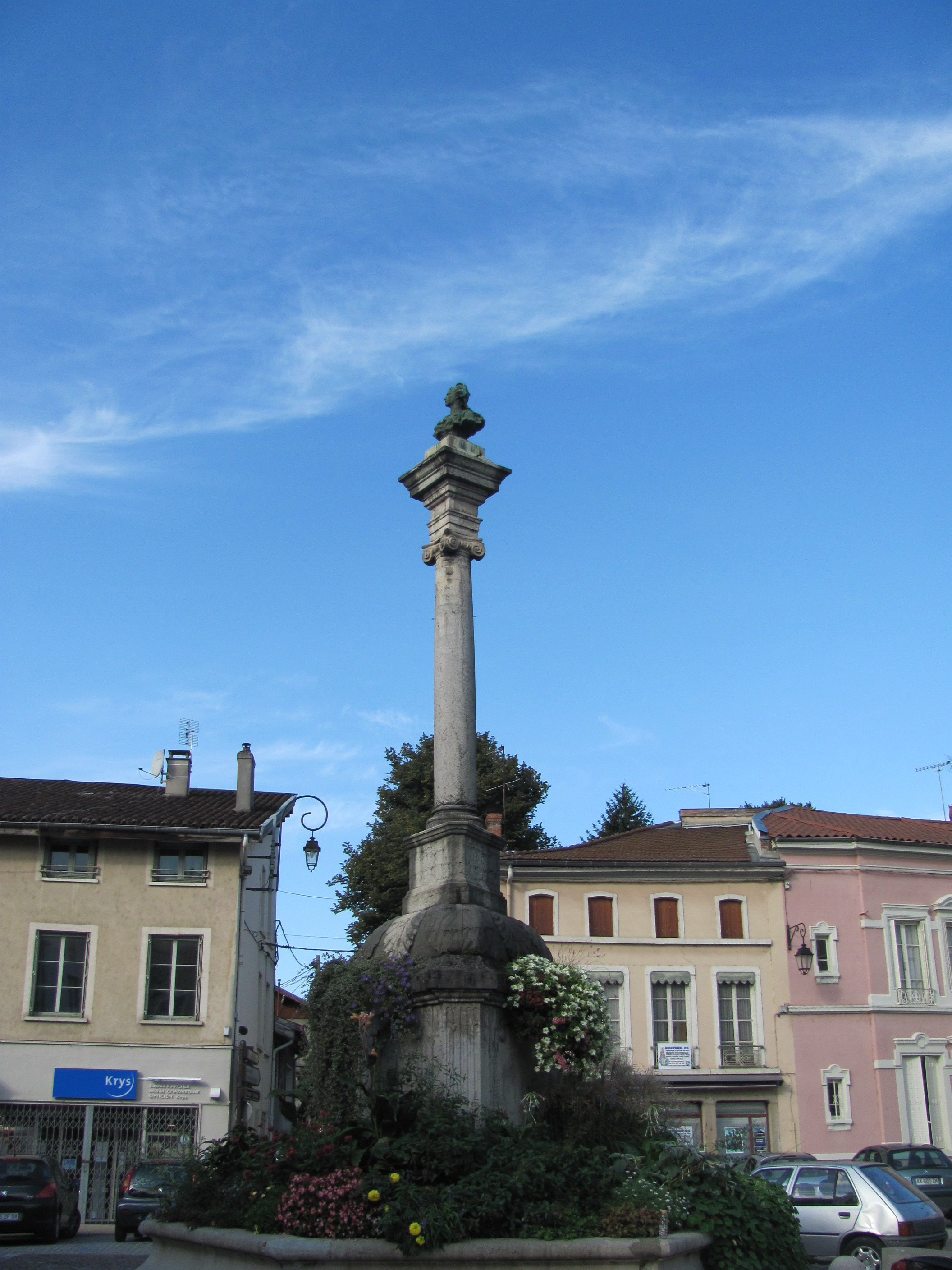 Place Carnot de Montluel